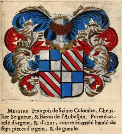 Wapen François de Sainte-Colombe-L'Aubespin.